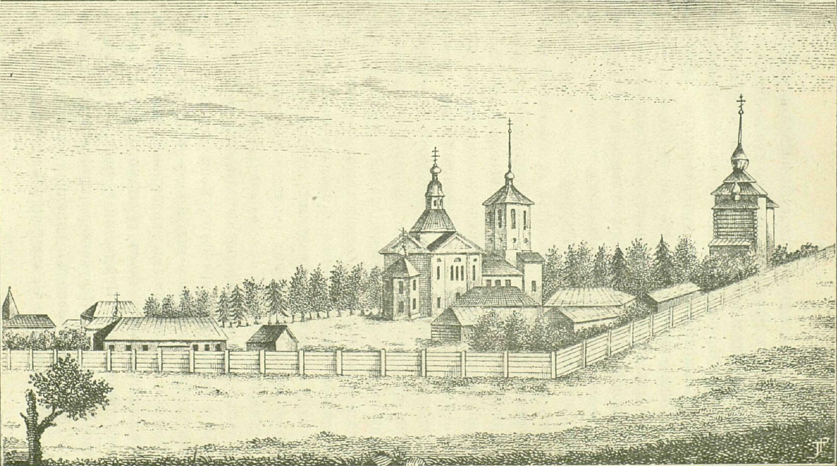 Древняя литография Усть-Киренского Свято-Троицкого монастыря